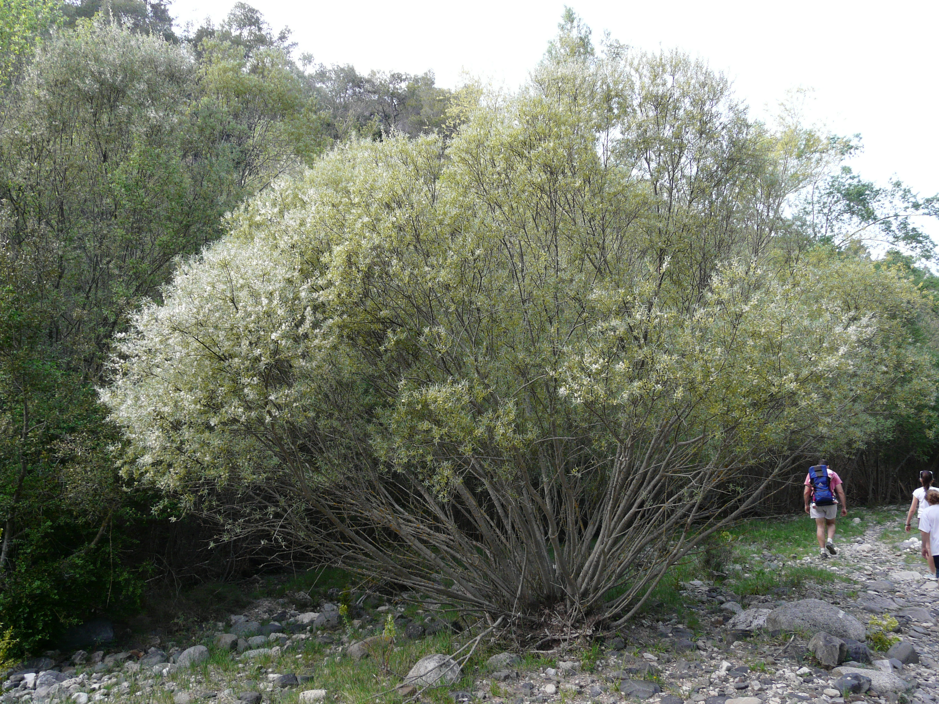 Muntanyes de Prades (Baix Camp, Conca de Barberà, Alt Camp, Priorat, Garrigues) (Montblanc, Vimbodí, Mont-ral i altres). This is a a photo of a natural area in Catalonia, Spain, with id: ES510143